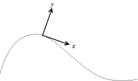 Définition du repère de Frenet. Auteur : Christophe Dang Ngoc Chan, réalisé avec un logiciel de dessin vectoriel. Licence GFDL Christophe Dang Ngoc Chan